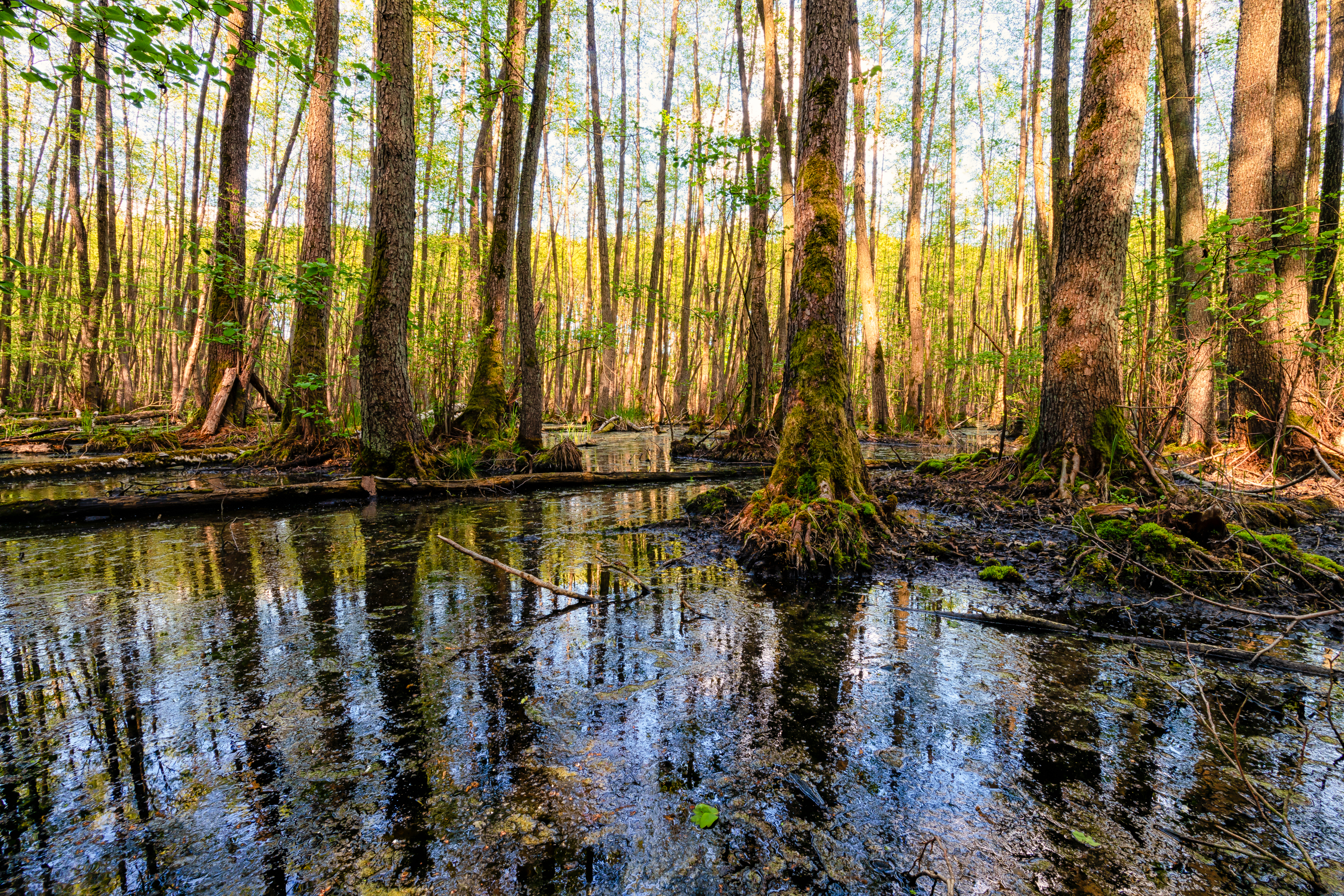 Sumpfige Landschaft, sehr naturbelassen, Feuchtwiesen und Wald